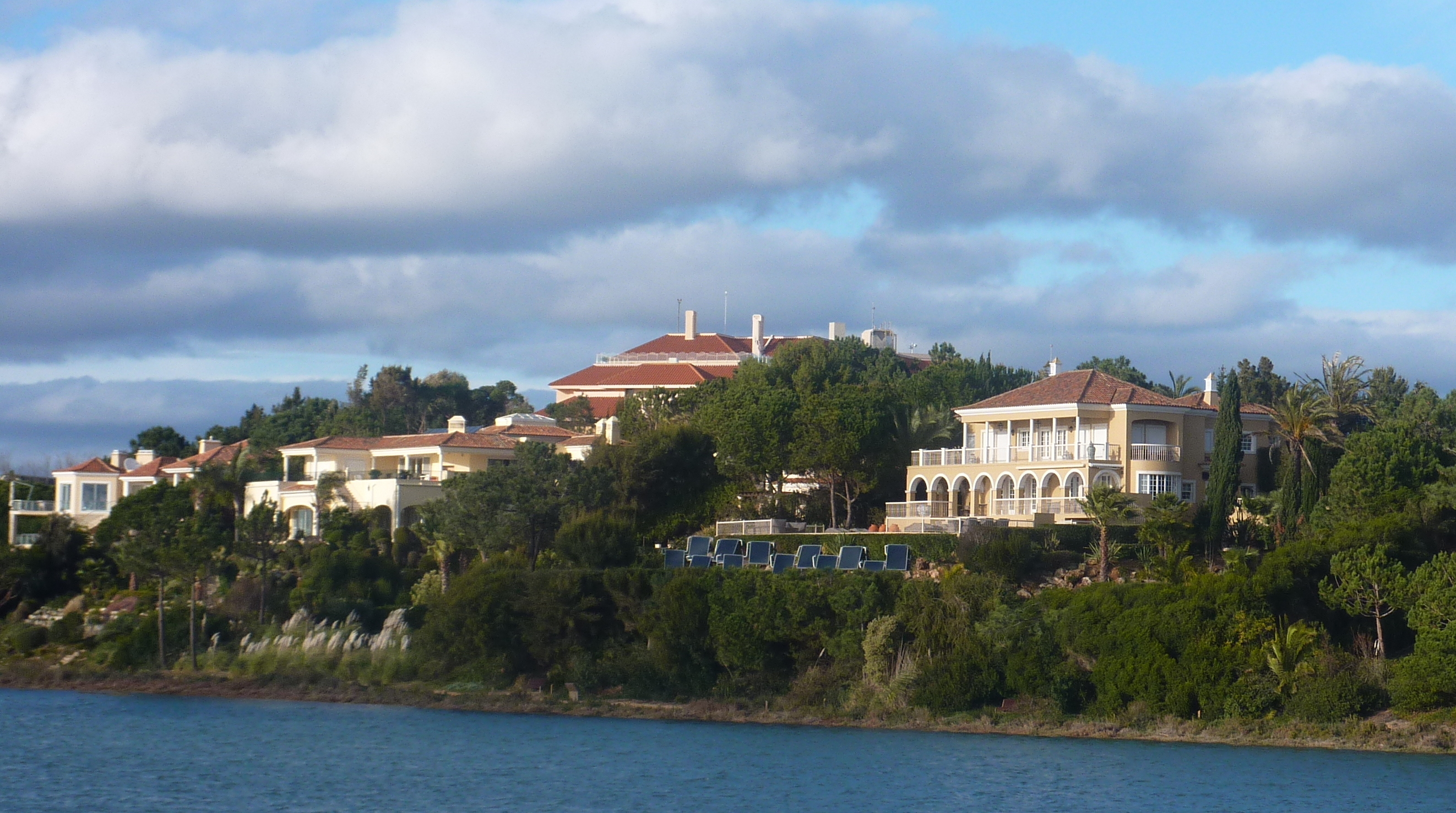 Quinta do Lago - upmarket properties